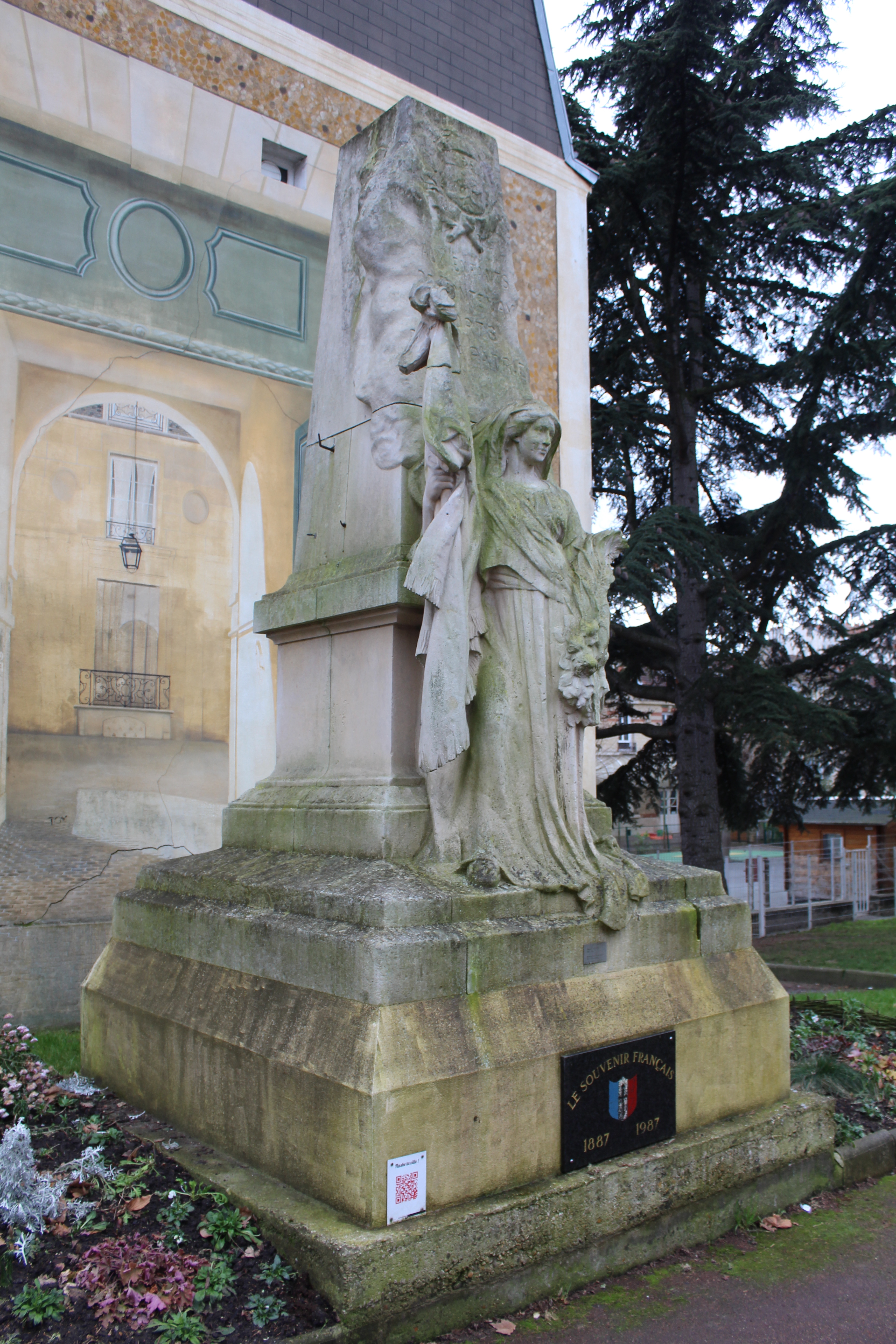 Monument aux morts de 1870 à Fontenay-sous-Bois.